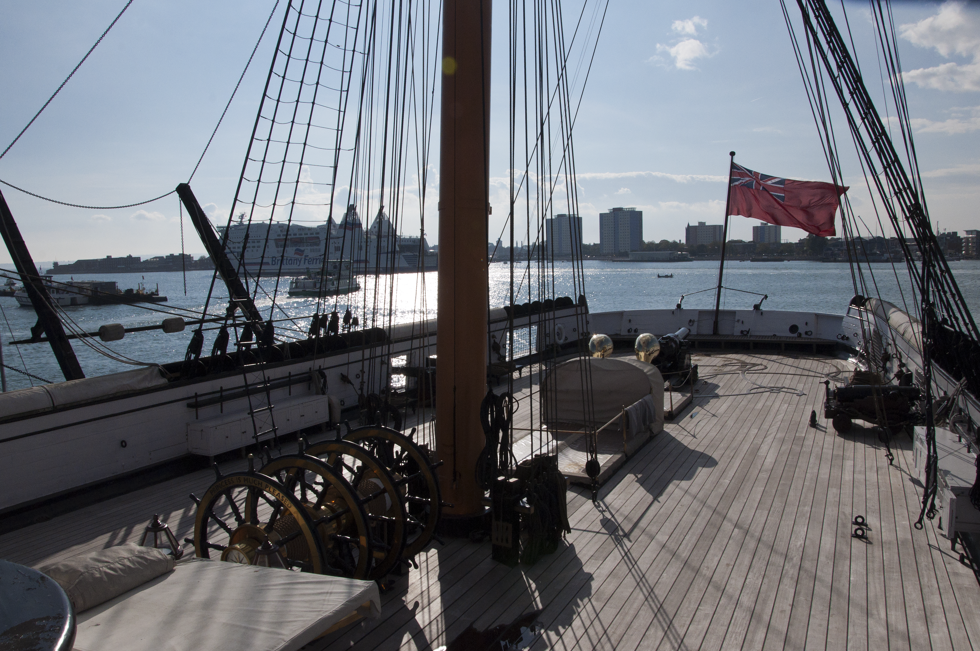 Achterzijde van het bovendek van de HMS Warrior te Portsmouth, Engeland